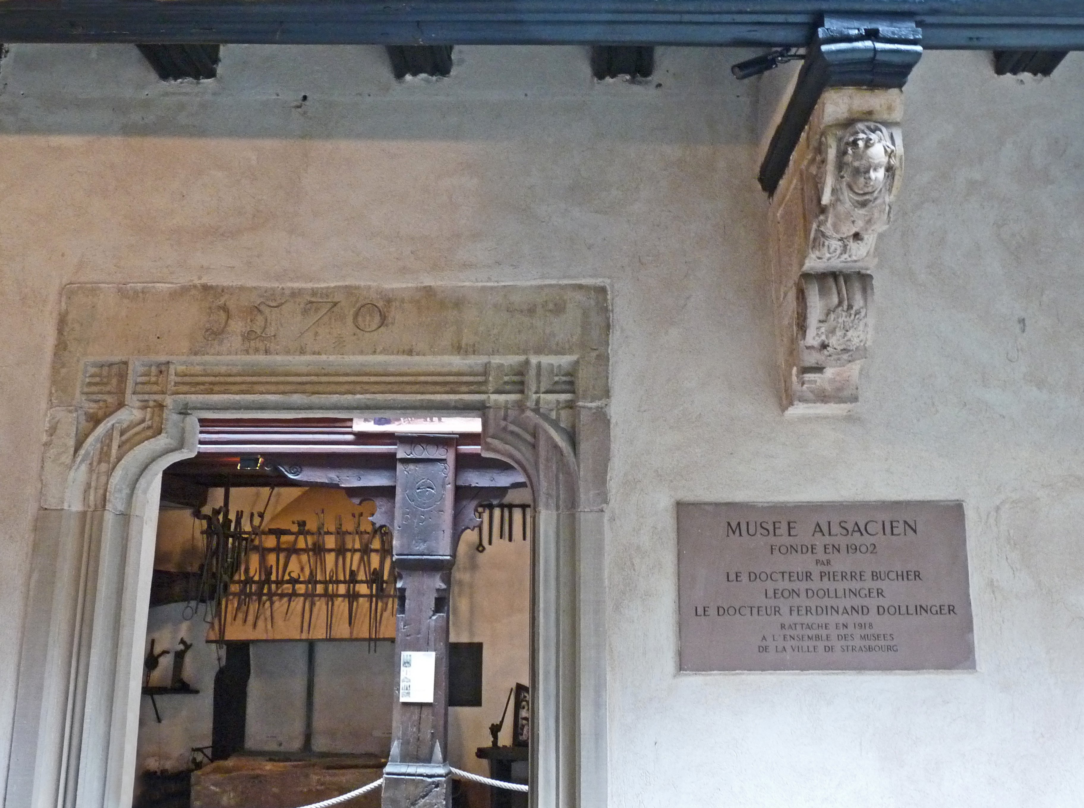 Plaque en hommage aux fondateurs du Musée alsacien de Strasbourg, Pierre Bucher, Léon Dollinger et son frère Ferdinand Dollinger.